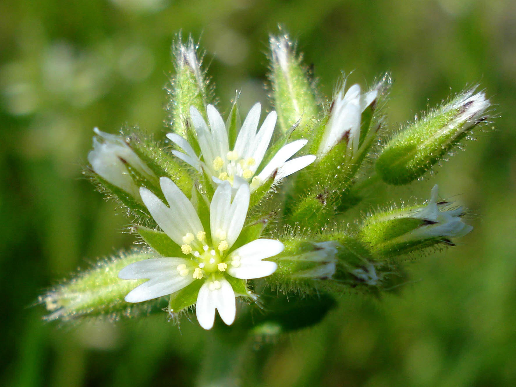 Cerastium glomeratum (Unterfranken, Germany)